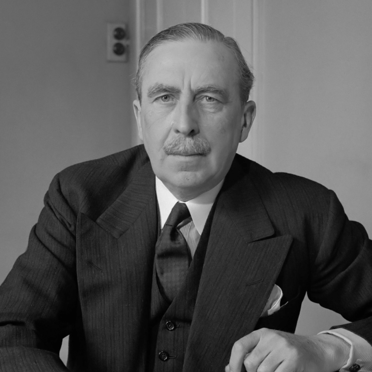 Jhr. E.F.M.S. Michiels van Verduynen. Nederlandse ambassadeur in Londen maart 1942